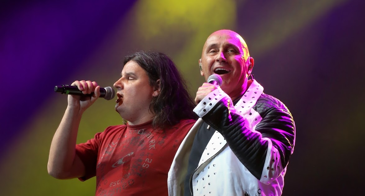 25 éves a Dévai Szent Ferenc Alapítvány - Nem Adom fel koncert az Arénában, 2018.08.13.